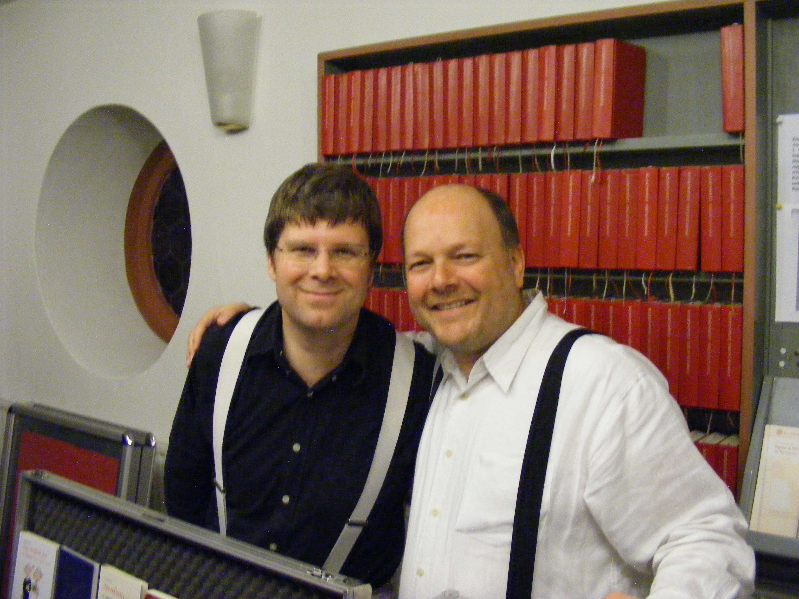 Duo Camillo am 28.01.2012 nach einem Auftritt in der Kirche in Naunheim